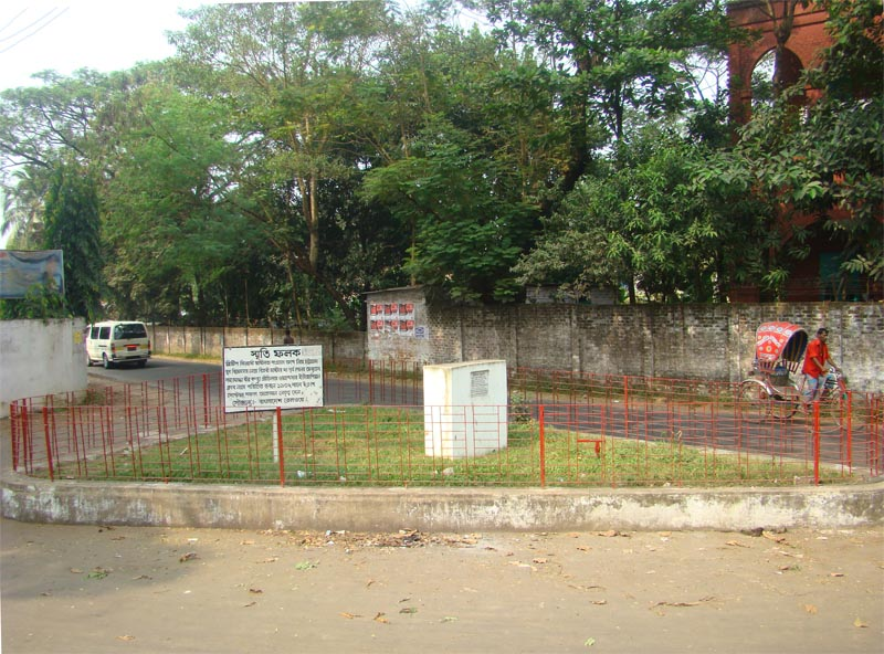 পাহাড়তলী ইউরোপিয়ান ক্লাবের সন্মূখে আত্নহত্যার স্থানে নির্মিত স্মৃতিস্তম্ভ।